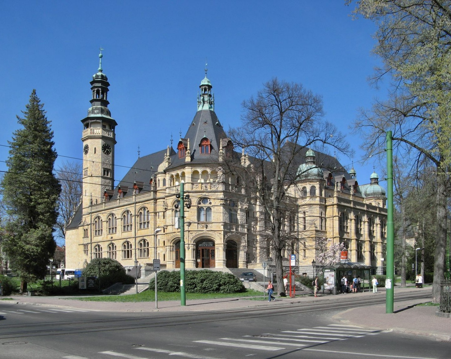 Severočeské muzeum, Liberec, Czech Republic